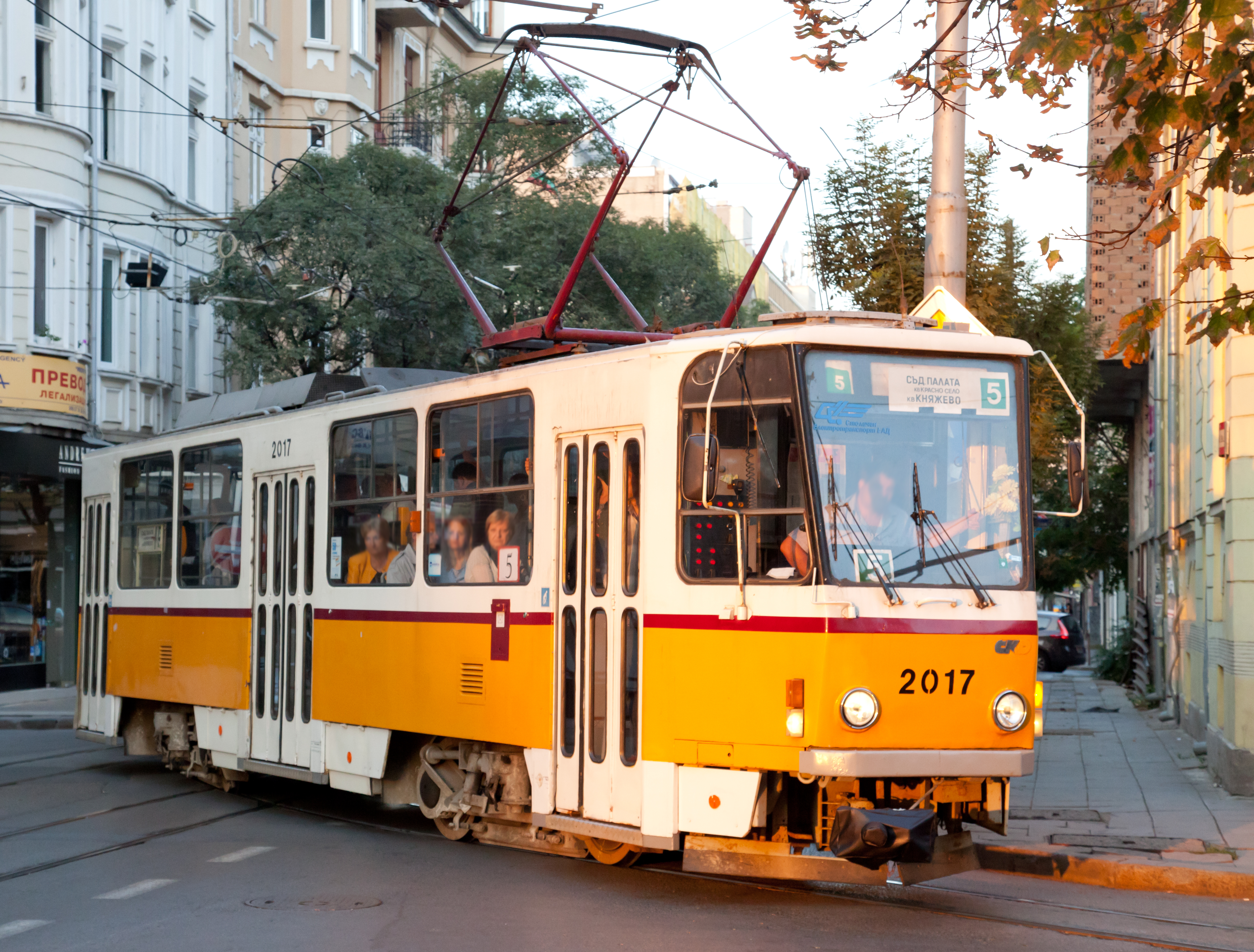 Straßenbahn in Sofia, vor und neben dem Justizpalast